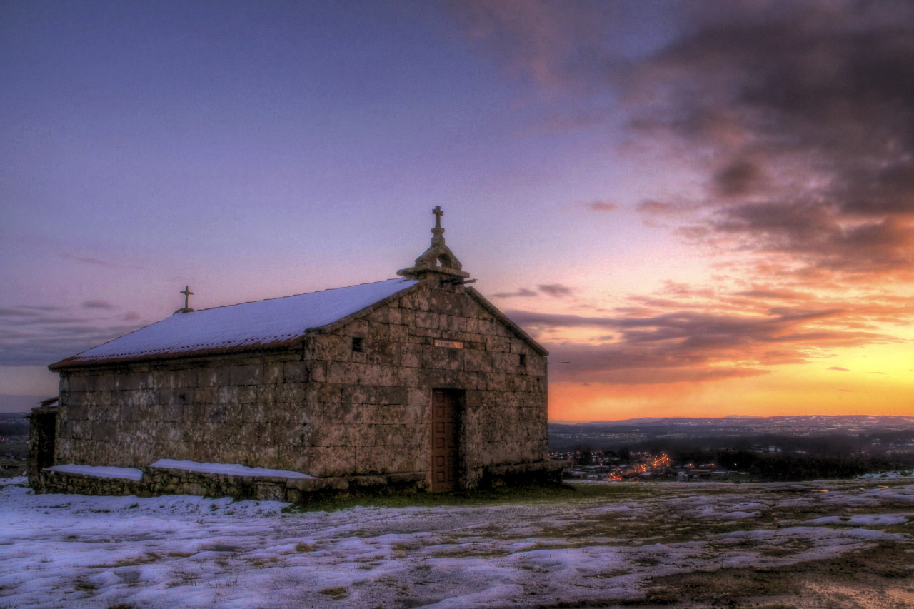 Presenta dous volumes, un máis antigo do século XIII ou XIV, que se correspondía co prebisterio e outro, moito máis recente, feito en bloques de cantería que se correspondería coa nave principal. En 1987, púxoselle o tellado e botóuselle unha placa de formigón e tella do país por fóra. No ano 1999 colocáronse nas inmediacións tres esculturas de gran tamaño feitas en pedra, copias das imaxes do retablo da capela, a virxe, Santo Antón e San Bartolomeu. Merece especial atención o retablo pétreo de estilo barroco con columnas salomónicas.